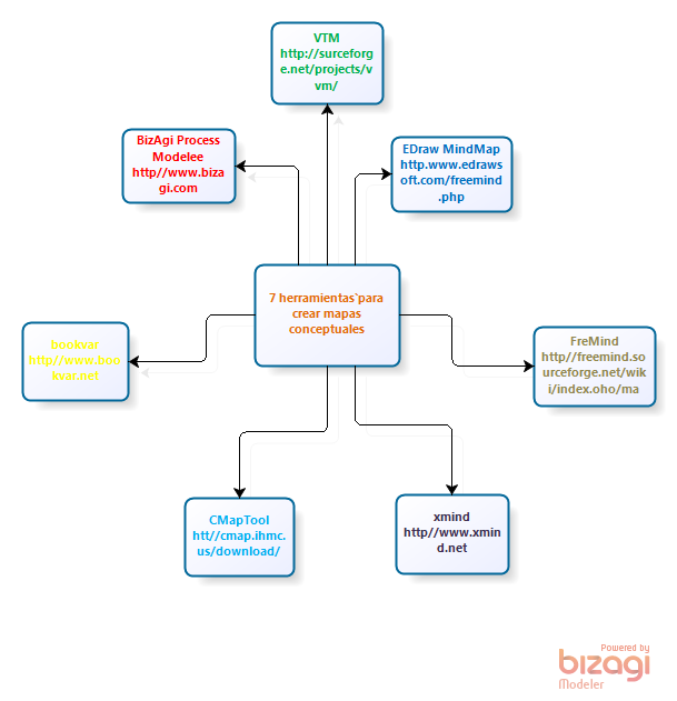 cuadros de textos